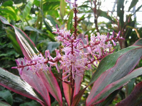 Cordyline fruticosa 'Aichiaka'